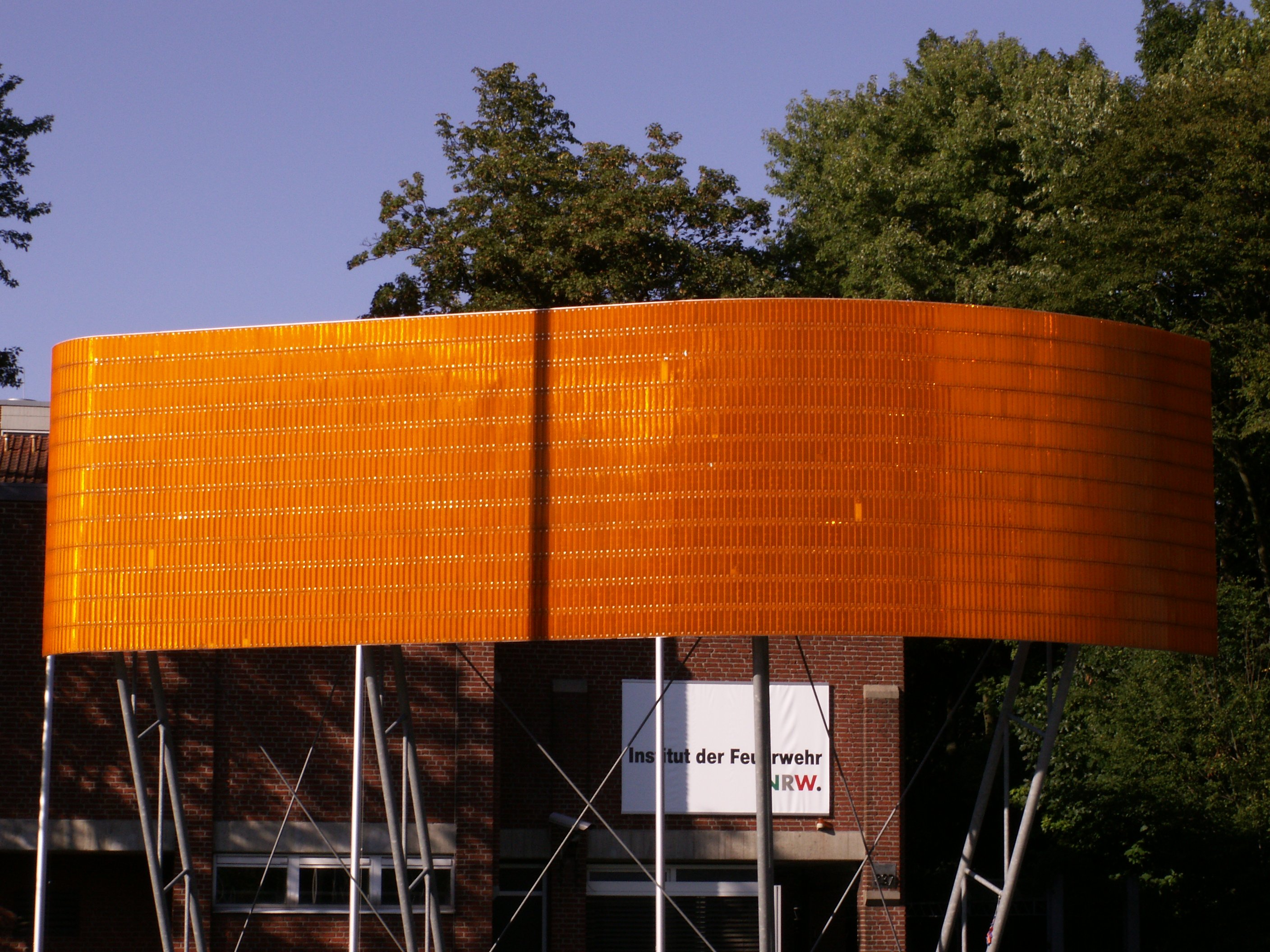 Münster, Deutschland, Skultpur "Reflexionswand" von Olaf Metzel